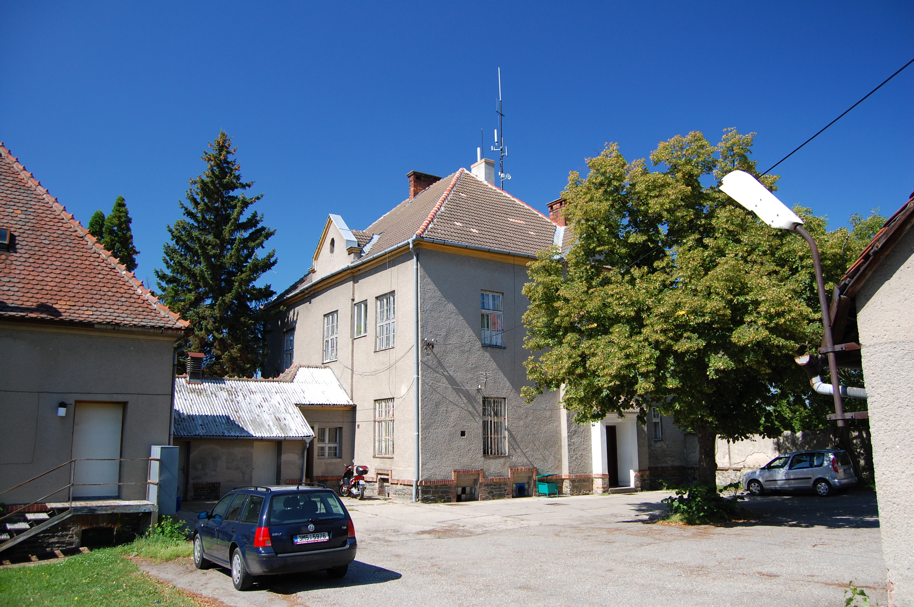 Stará poliklinika, Konice, okres Prostějov